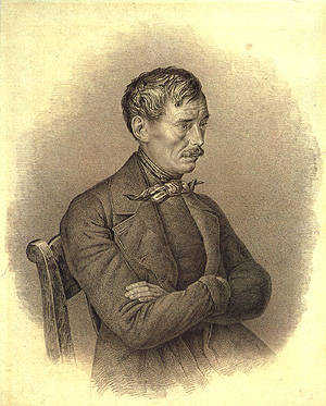 Борисов, Пётр Иванович